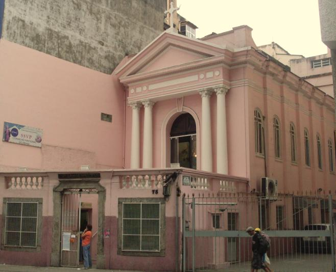 Fachada da Capela do Menino Deus